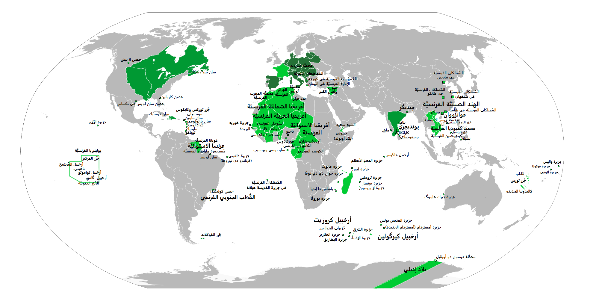 خريطة الإمبراطوريَّة الفرنسيَّة. اللون الأخضر الغامق يُشيرُ إلى مناطق سيطرة ونُفوذ الإمبراطوريَّة الفرنسيَّة الاستعماريَّة الأولى (حُدود تقريبيَّة)، أمَّا اللون الأخضر الفاتح فيُشير إلى المناطق التي خضعت لِلإمبراطوريَّة الفرنسيَّة الاستعماريَّة الثانية.